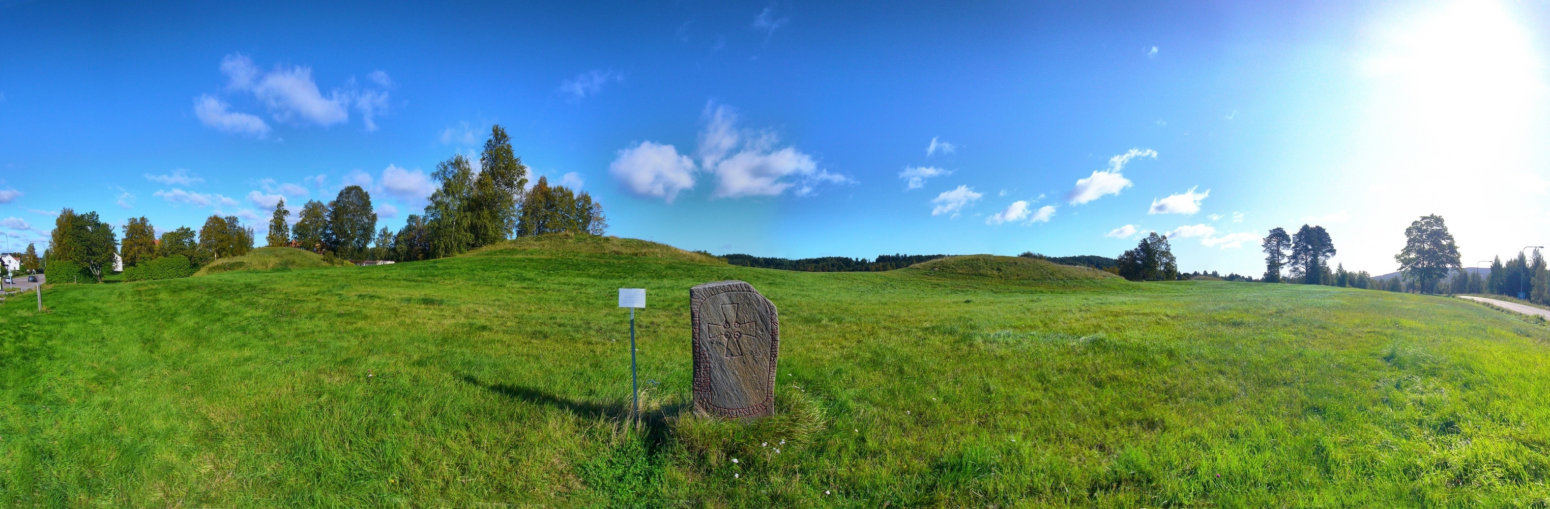 180 grader panoramavy mot nordost över Högomfältet från platsen vid Runstenen.